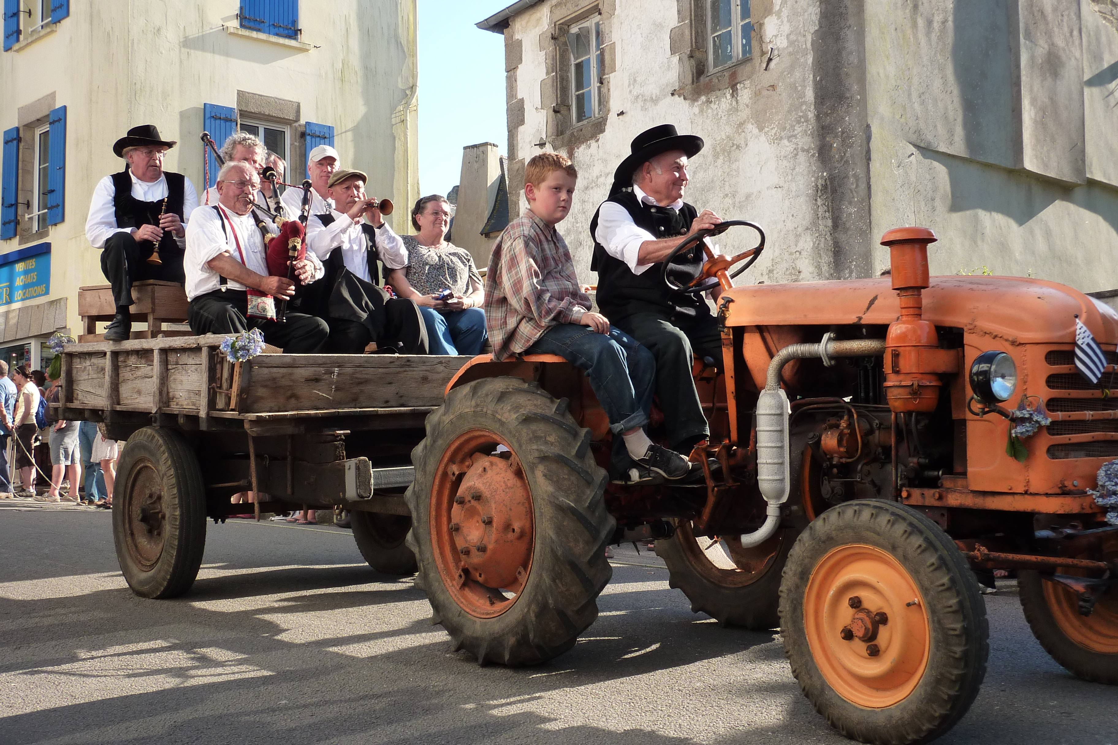 Pont Croix - Mouez ar Gelted - procession - Re An Are